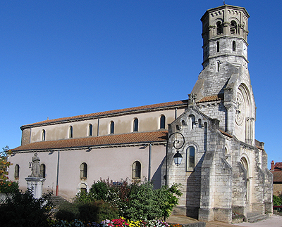 fr